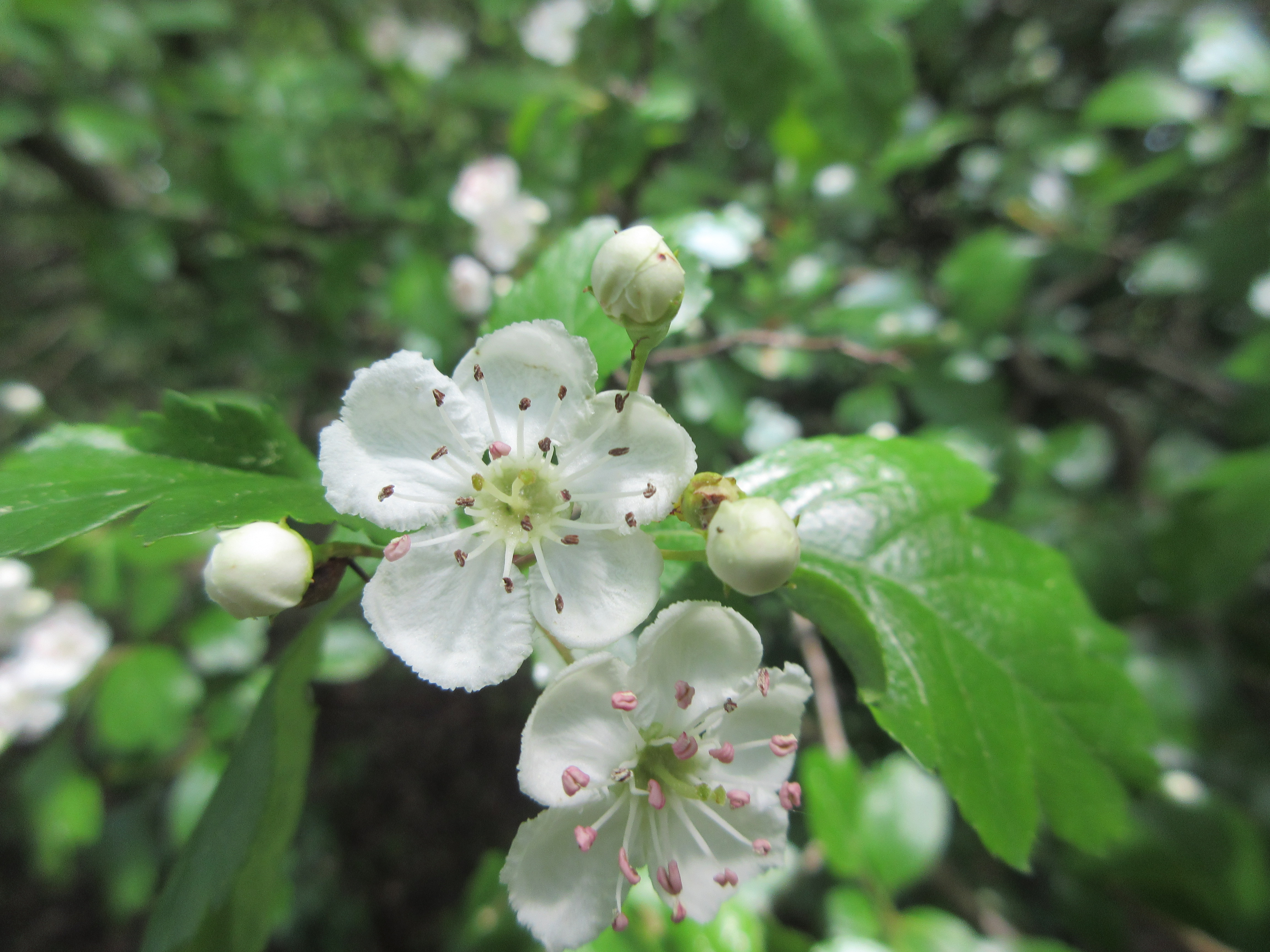 Crataegus laevigata, Dolní Houžovec, Czech Republic